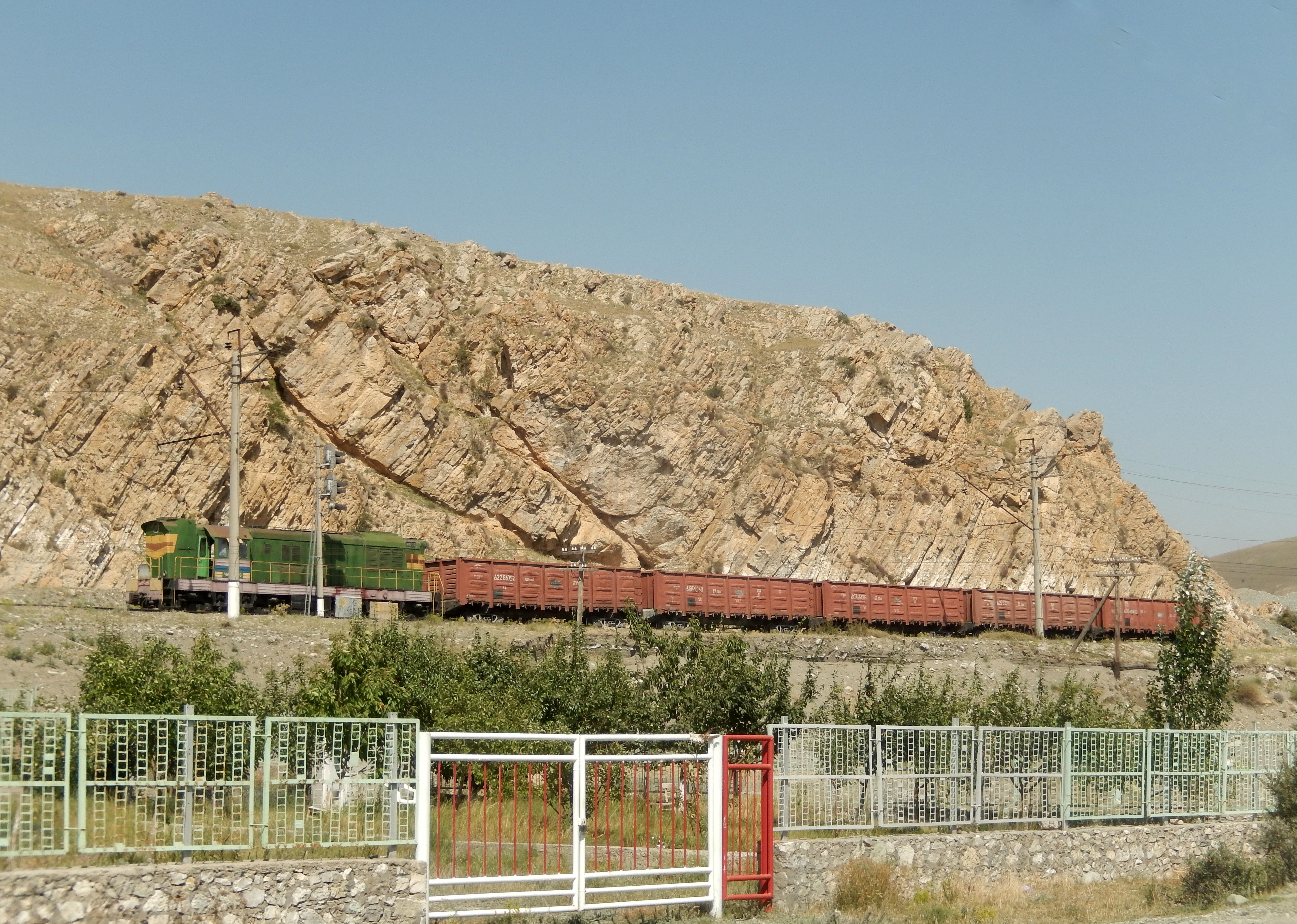 Շորժա, երկաթուղի